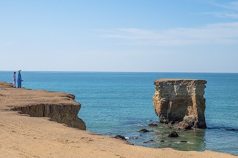 بندر تنگ سیستان و بلوچستان بندر تنگ بخش کوچکی است در شهر چابهار که به دلیل تلاقی کویر و دریا در این منطقه جذابیت های ویژه ای به وجود آمده که جلوه ی بی نظیری را به این روستا بخشیده است. شهرستان کنارک که در جنوب شرقی ایران و در سواحل زیبای دریای عمان قرار گرفته است، از دیرباز با اسکله صیادی بزرگ و فعالش یاد می‌شود. جاذبه های طبیعی بکر و بی نظیری در این بخش کوچک بندری وجود دارد دل هر گردشگری را می برد.سواحل شنی و ماسه ای و صخره ای وجود درخت انجیر معابد و تپه های گل افشان از جاذبه های این بندر بی نظیر است.